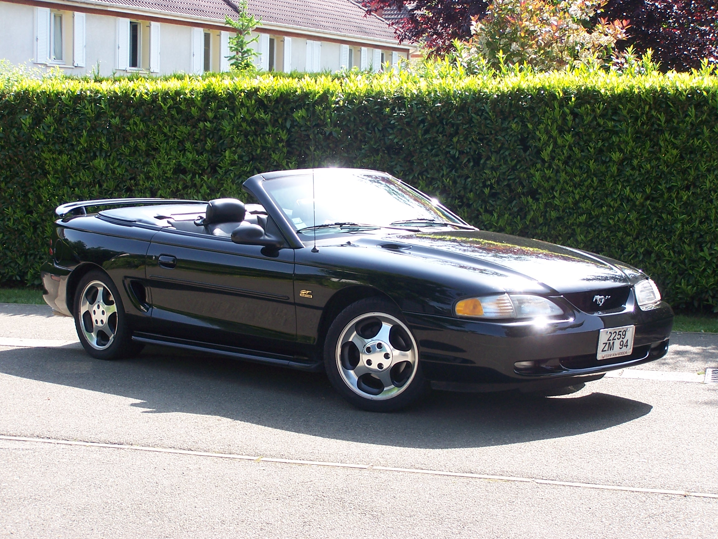 Exemple de Ford Mustang année 1995